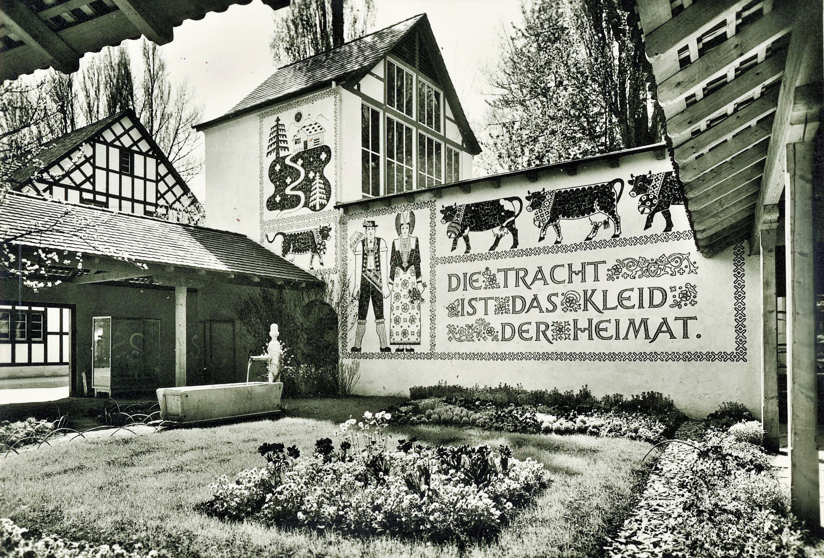 Schweizerische Landesausstellung 1939 in Zürich, Landi/"Dörfli" (Aussenansichten). Im Trachtenhof = La cour des costumes = Atrio dei Costumi